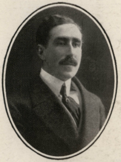 Diputado y senador del Partido Conservador